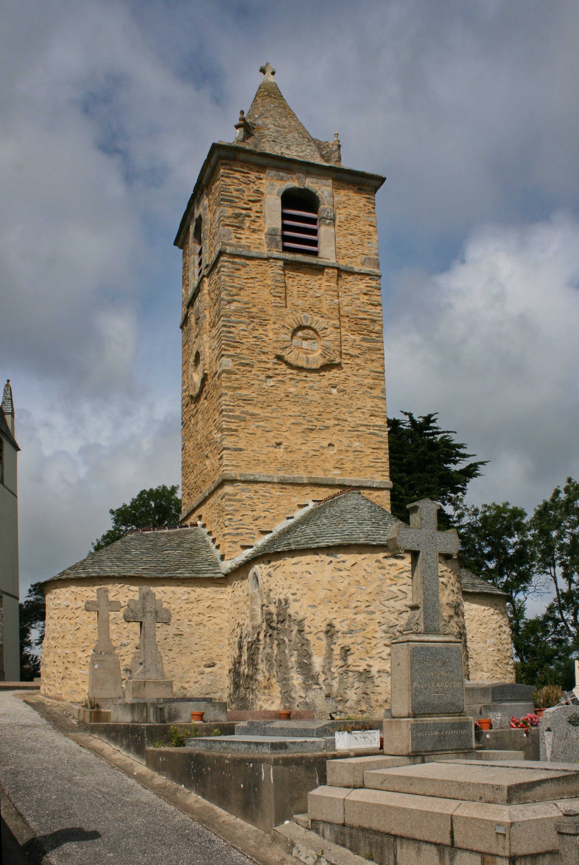 Chapelle Saint-Germain de Querqueville.La nef et les trois absides sont en plaquettes de schiste disposées en arête-de-poisson. La tour ajoutée au XVIIe ou XVIIIe siècle est en assises horizontales